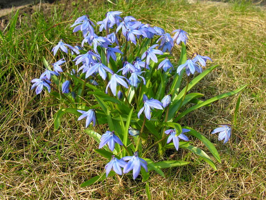 Sibirinė scylė (Scilla siberica) Šeima. Hiacintiniai (Hyacinthaceae) Foto: Algirdas, 2006 m. balandžio 26 d.